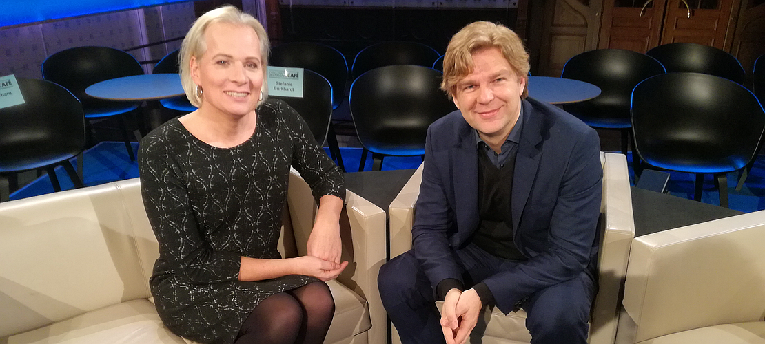 SWR Nachtcafé Unter Druck